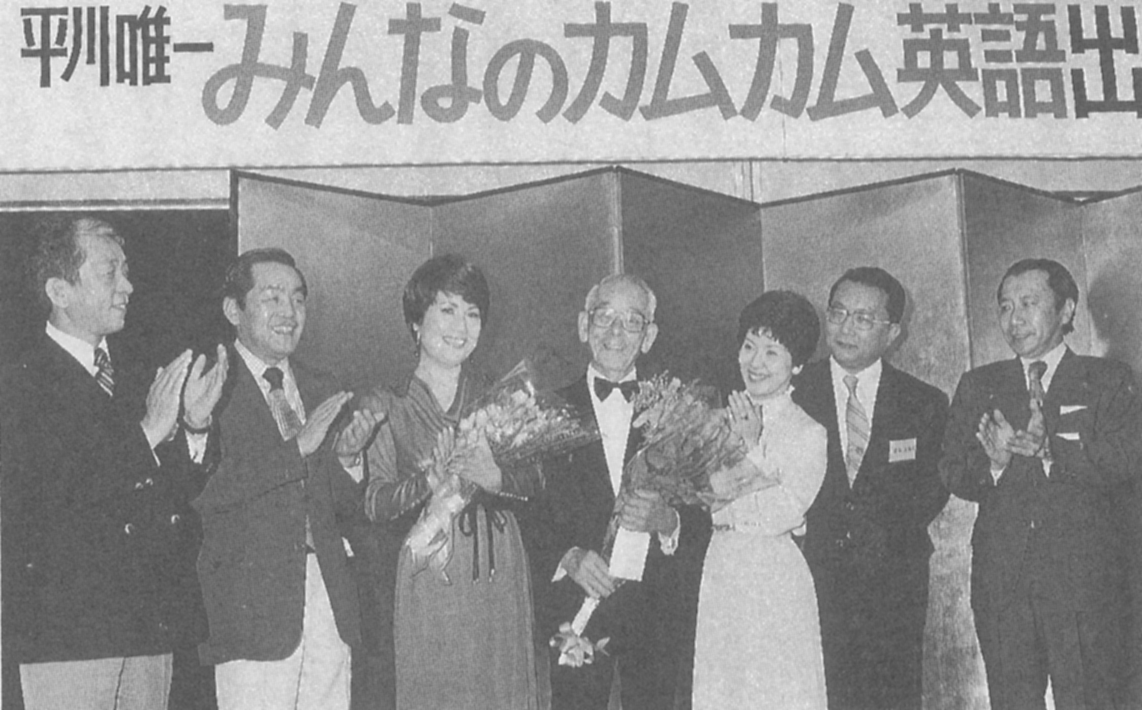 平川唯一出版記念パーティーの写真